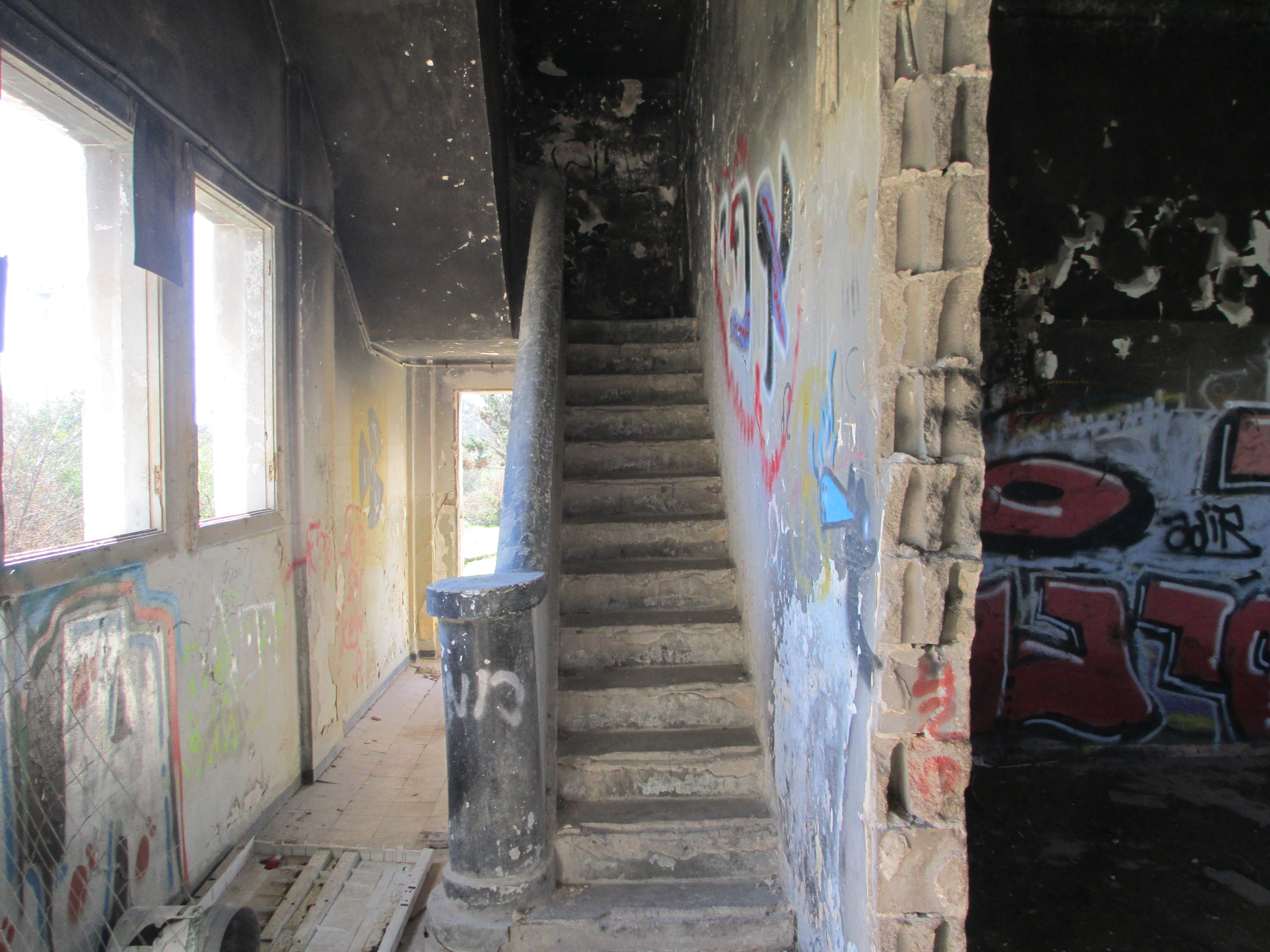 מפקדת חסן סלמה - מדרגות לקומה הראשונה